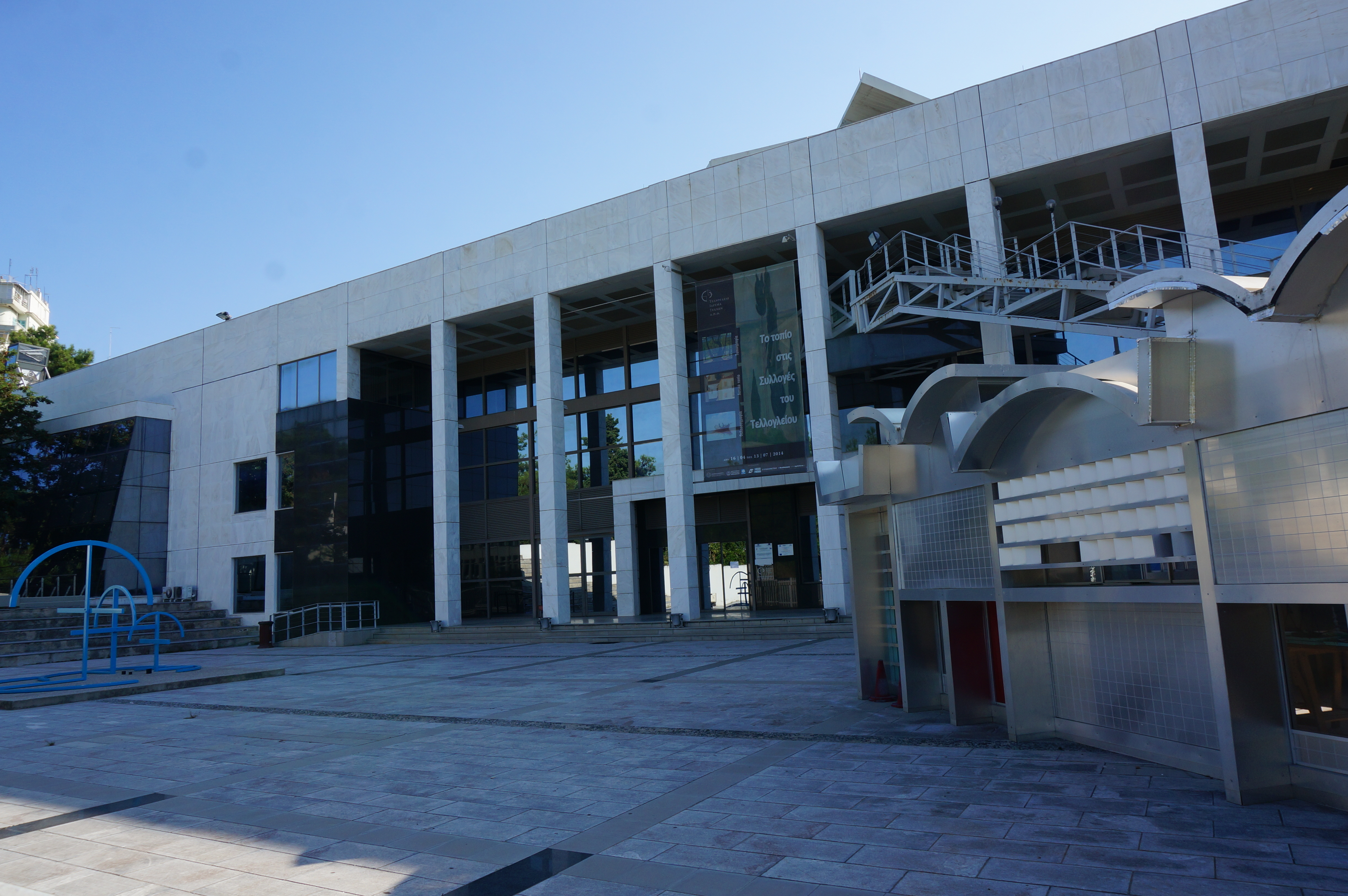 une vue de la : cf le titre.